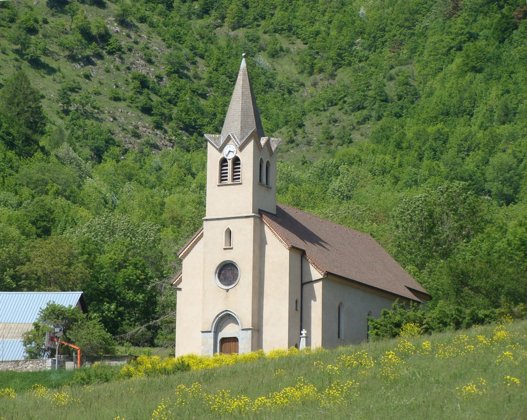 L'église d'Aspres-lès-Corps (Hautes-Alpes). Le clocher-tour carré surmonté d'une flèche octogonale fait corps avec la façade.